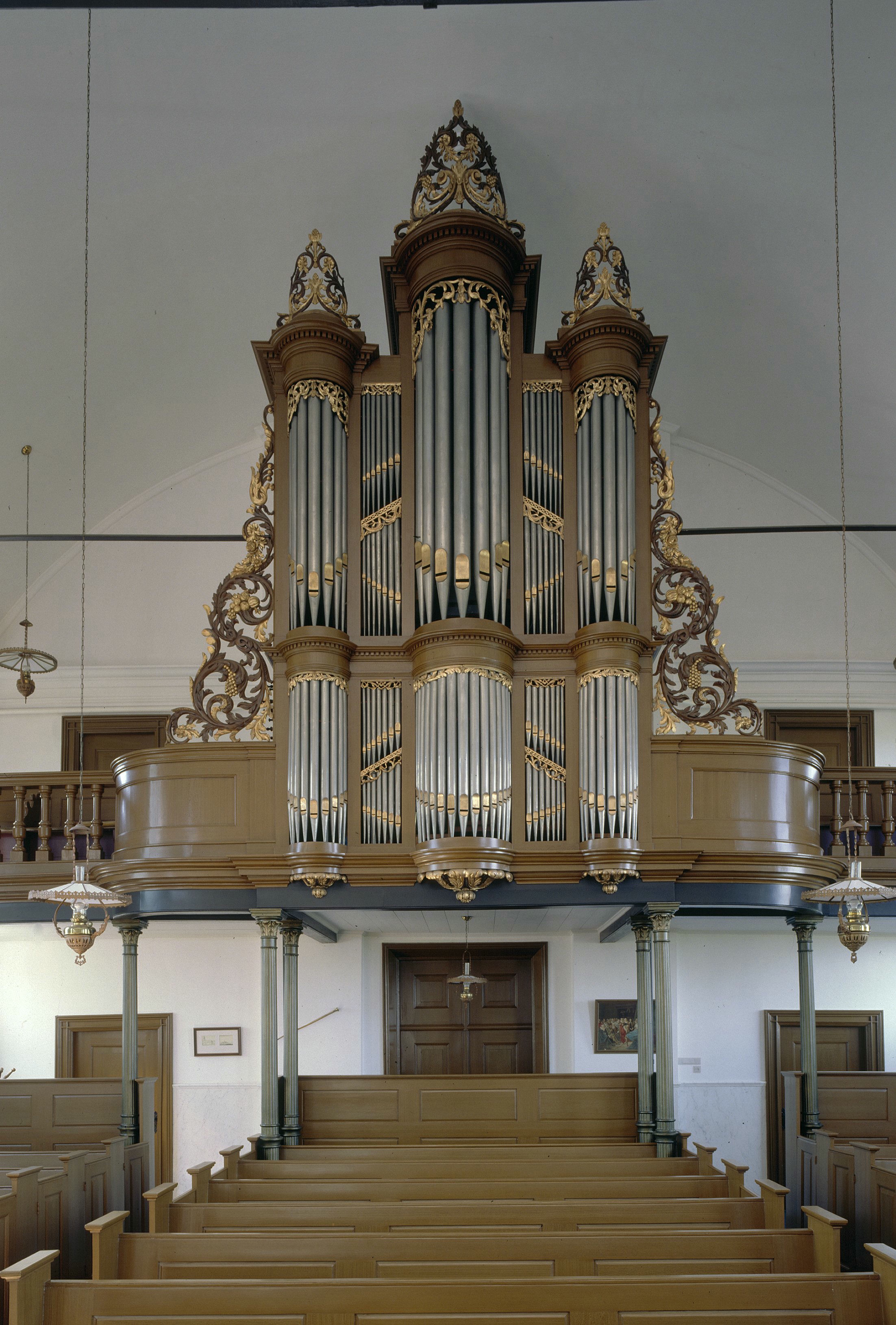 Nederlands Hervormde Kerk: Interieur, aanzicht orgel, orgelnummer 1158 (opmerking: Gefotografeerd voor Het Historische Orgel in Nederland 1819-1840, bladzijde 363)